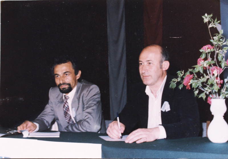 Национална учредителна конференция - ДПС, гр. София, Йенал Бекир, Ахмед Доган